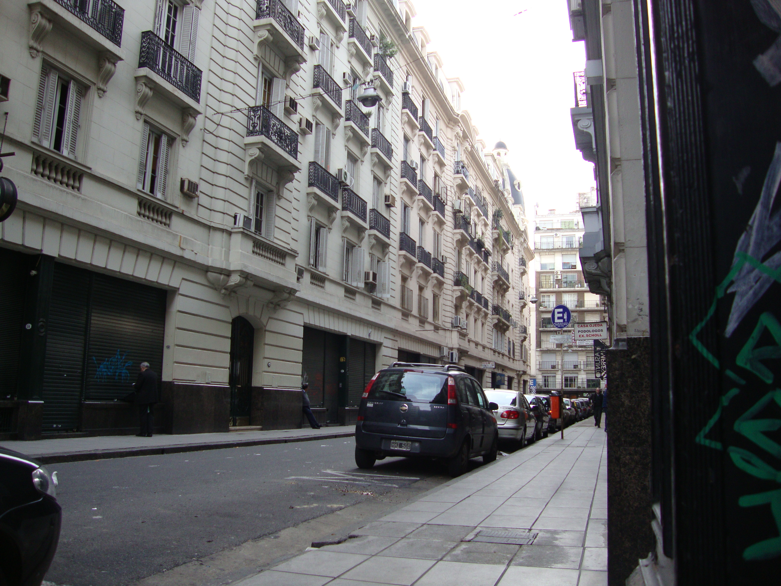 Vista del Pasaje Rivarola hacia la calle Mitre. Buenos Aires.